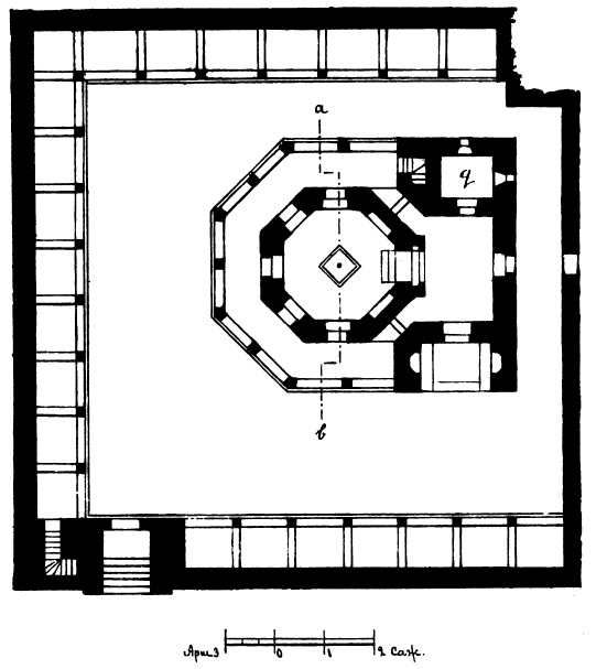 План Ханского судилища в Баку